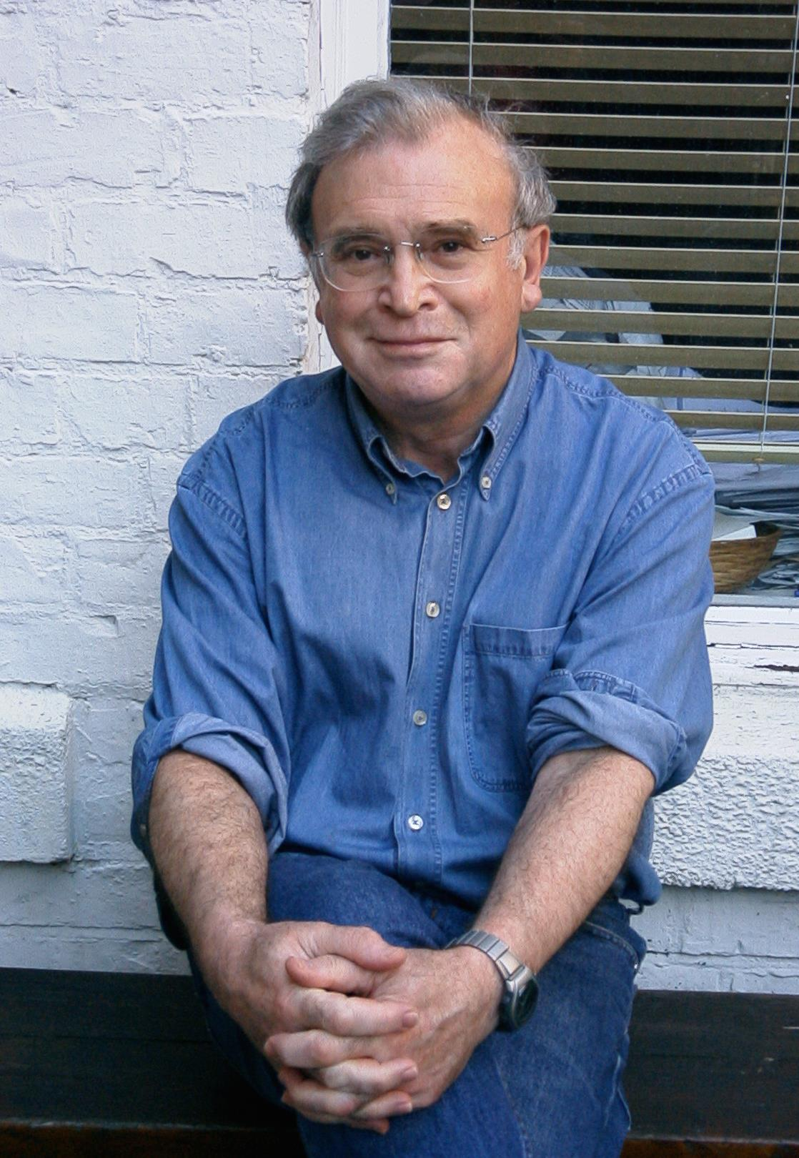 Долуханов Павел Маркович